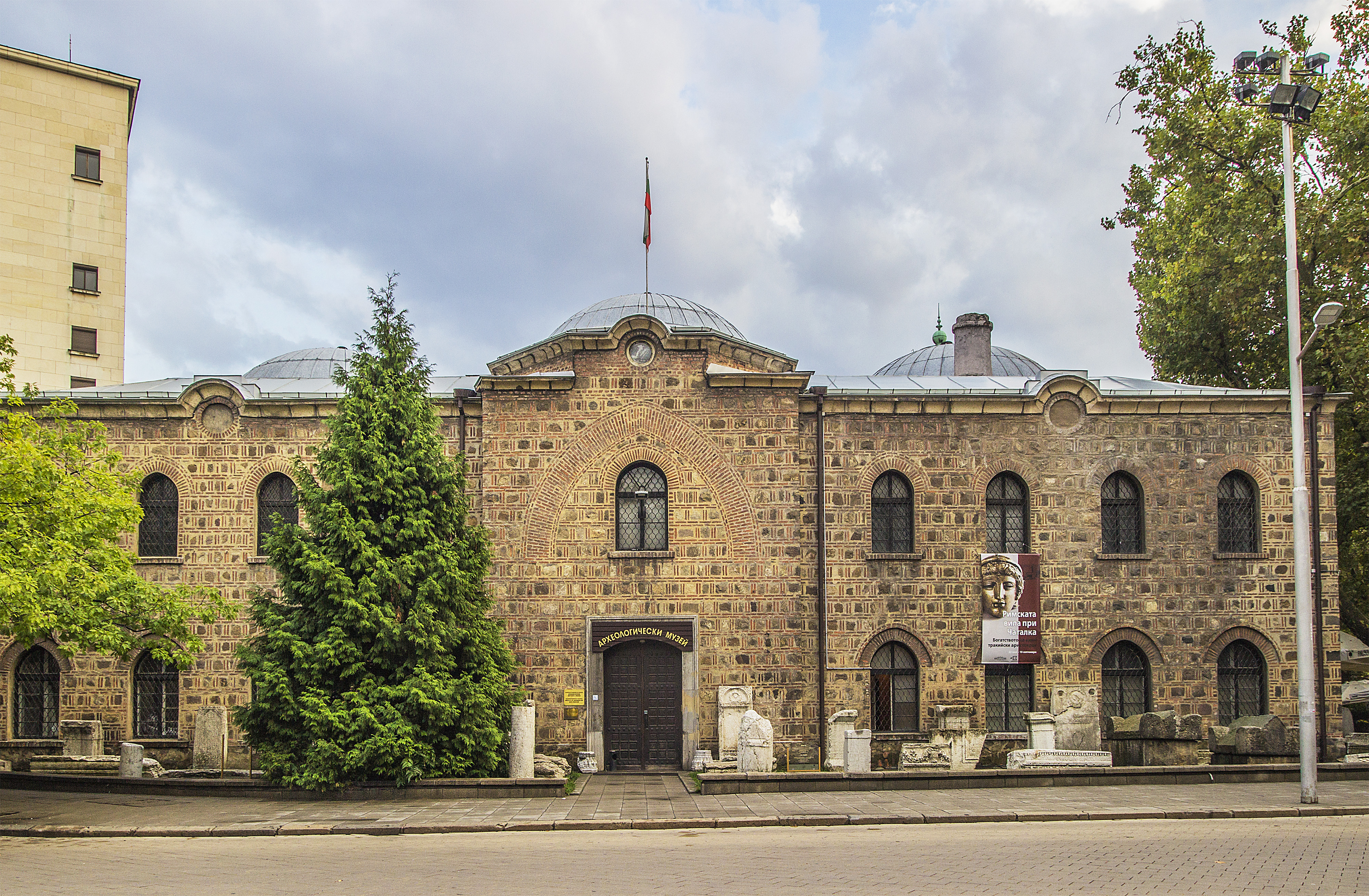 Централното историческо ядро на София